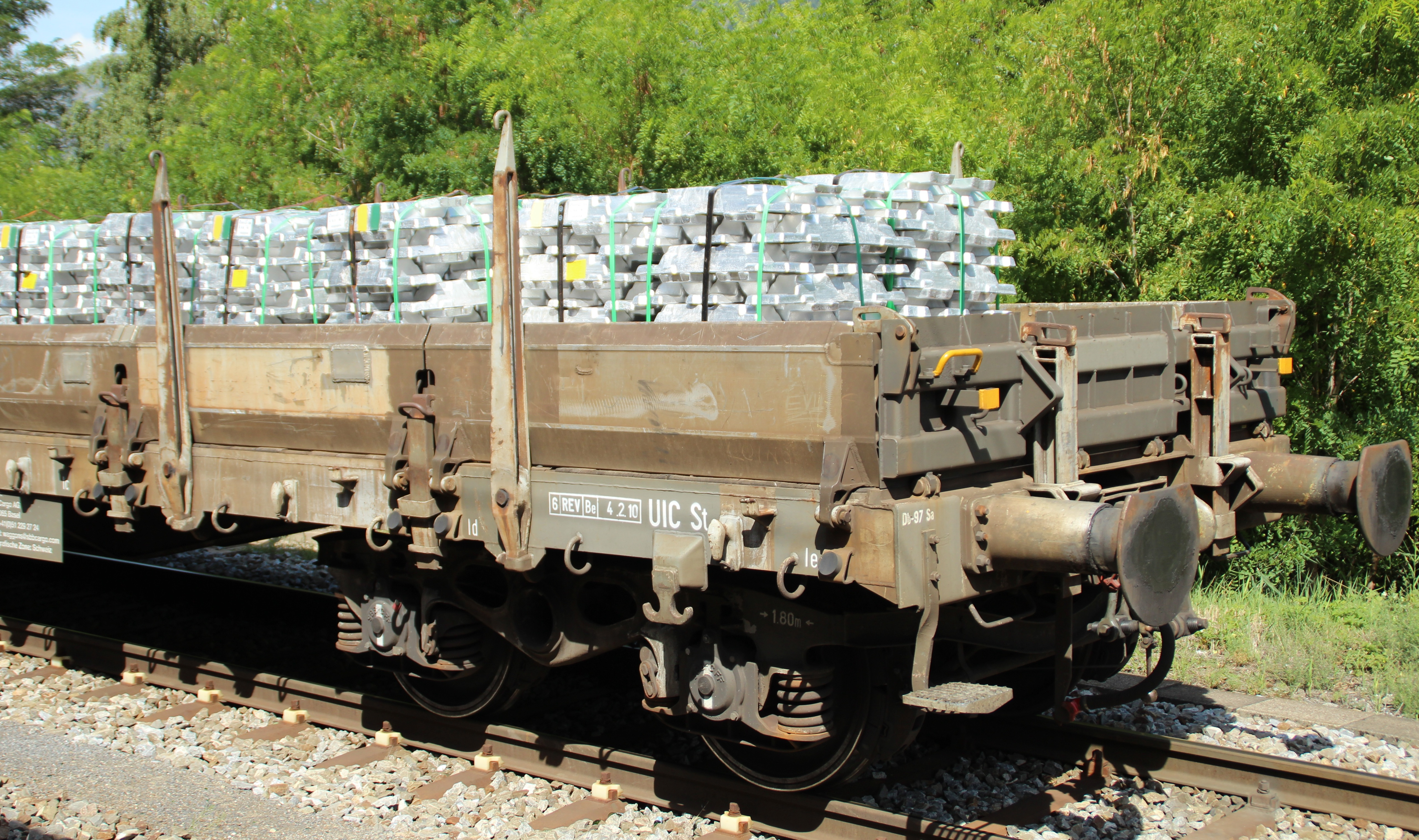 Aluminium, Alubarren aus dem Lonzawerk im Wallis